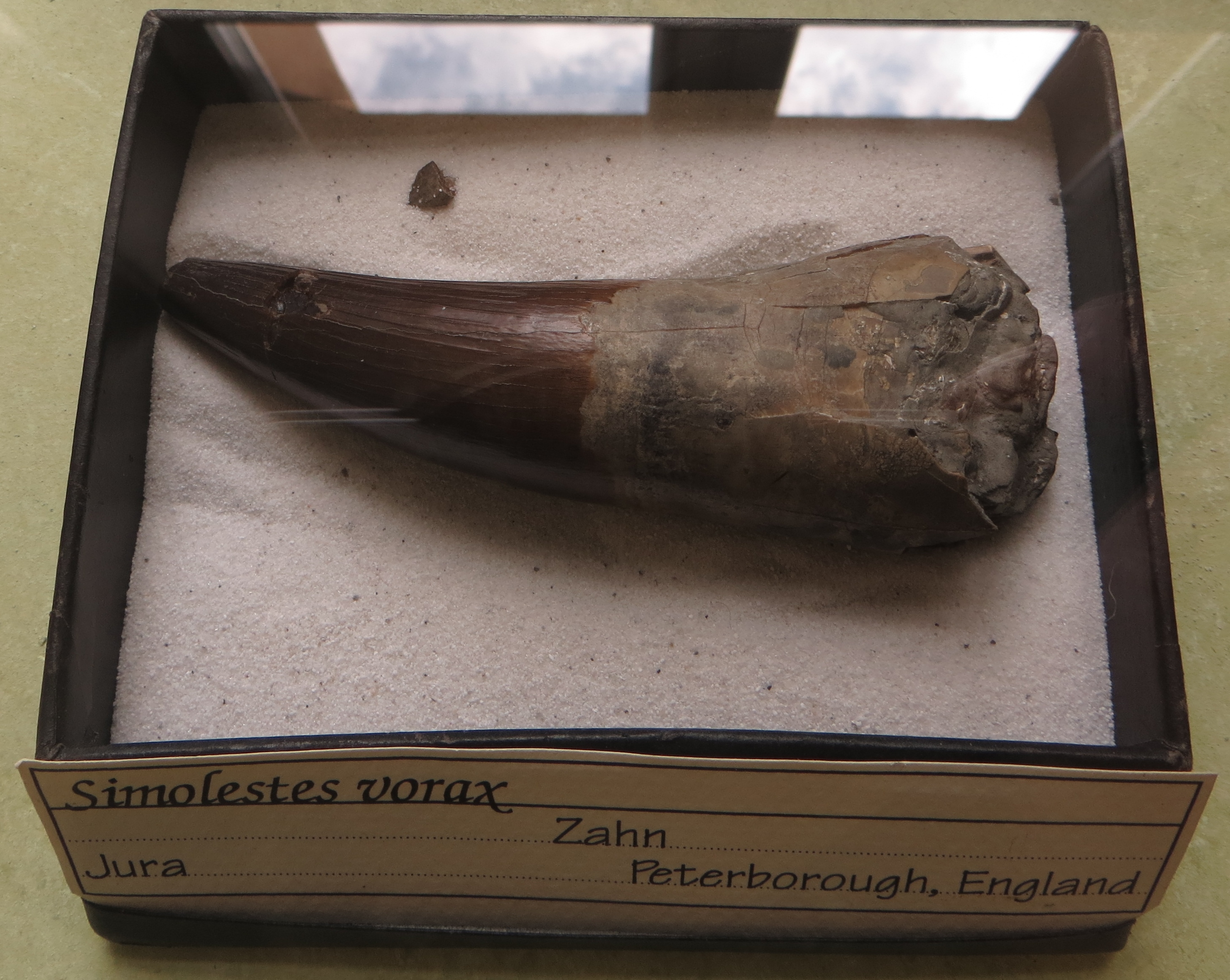 Fossil of Simolestes - Took the picture at Natural History Museum, Bonn University